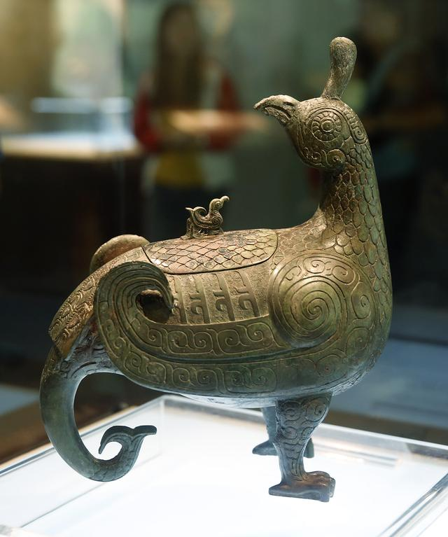 中文（中国大陆）: 晋侯鸟尊（西周）